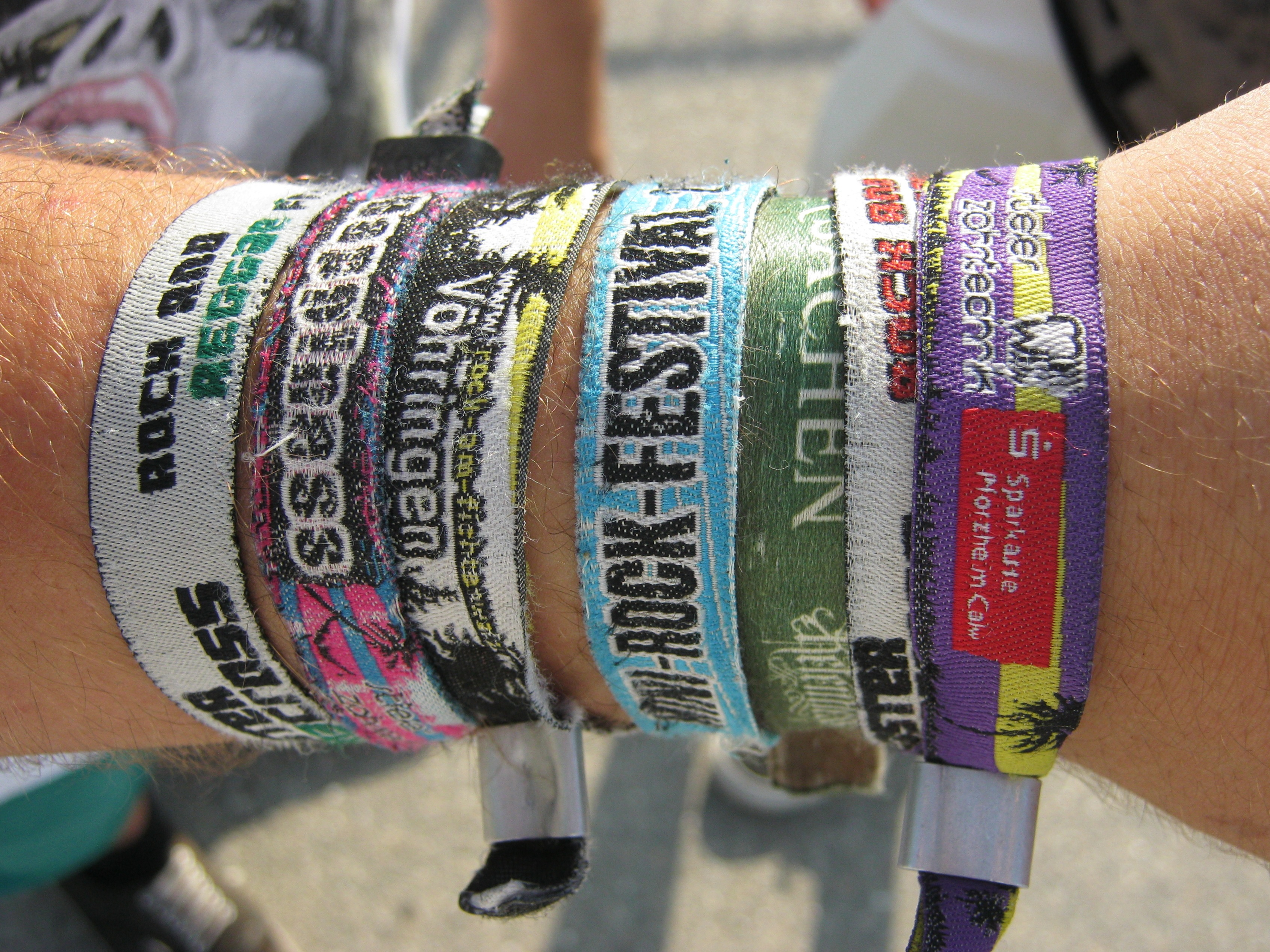 Festivalbänchen